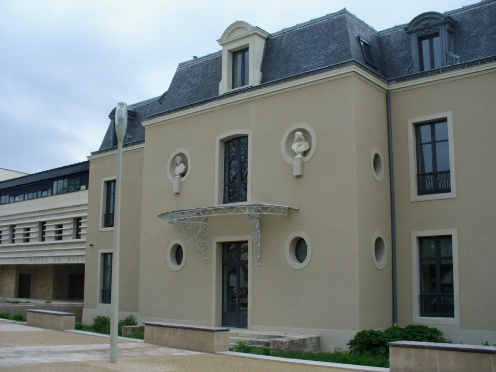 Mairie de Combs-la-Ville (Seine-et-Marne)